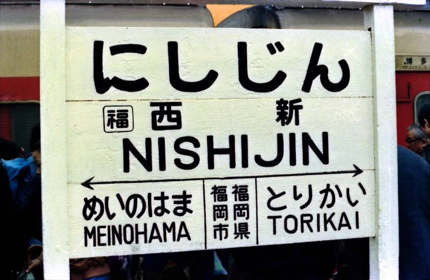 国鉄筑肥線西新駅